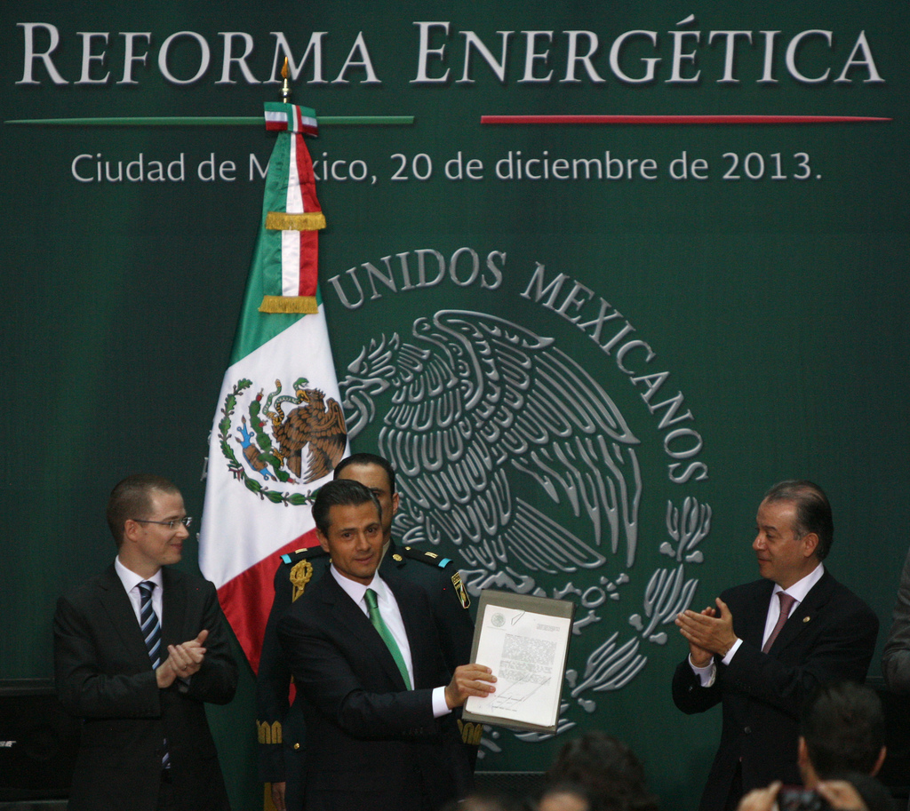 Ricardo Anaya Cortés, Enrique Peña Nieto y Raúl Cervantes Andrade. Promulgación de la Reforma Constitucional en Materia Energética. Palacio Nacional, Ciudad de México. 20 de diciembre de 2013.